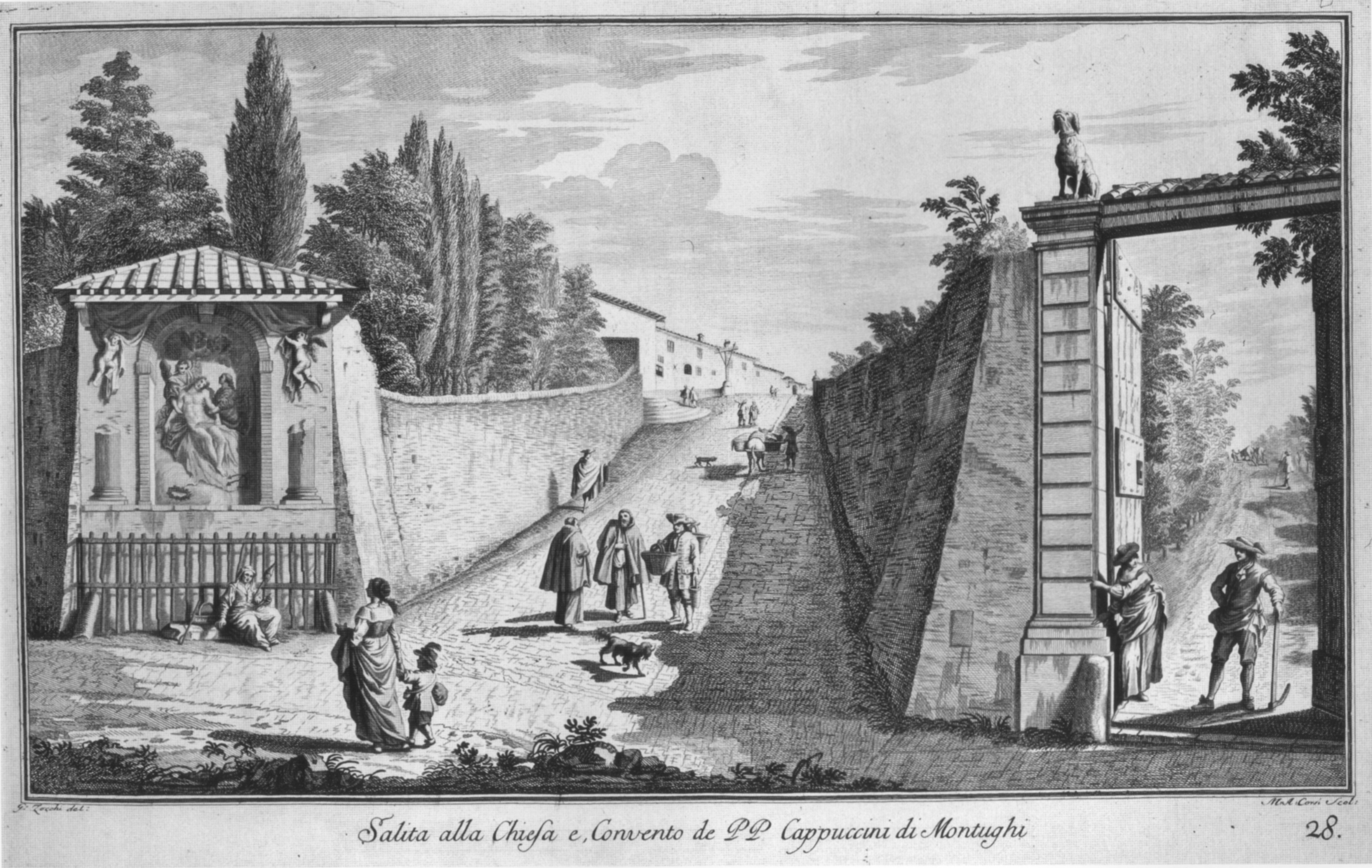 Zocchi, ville 30 cappuccini